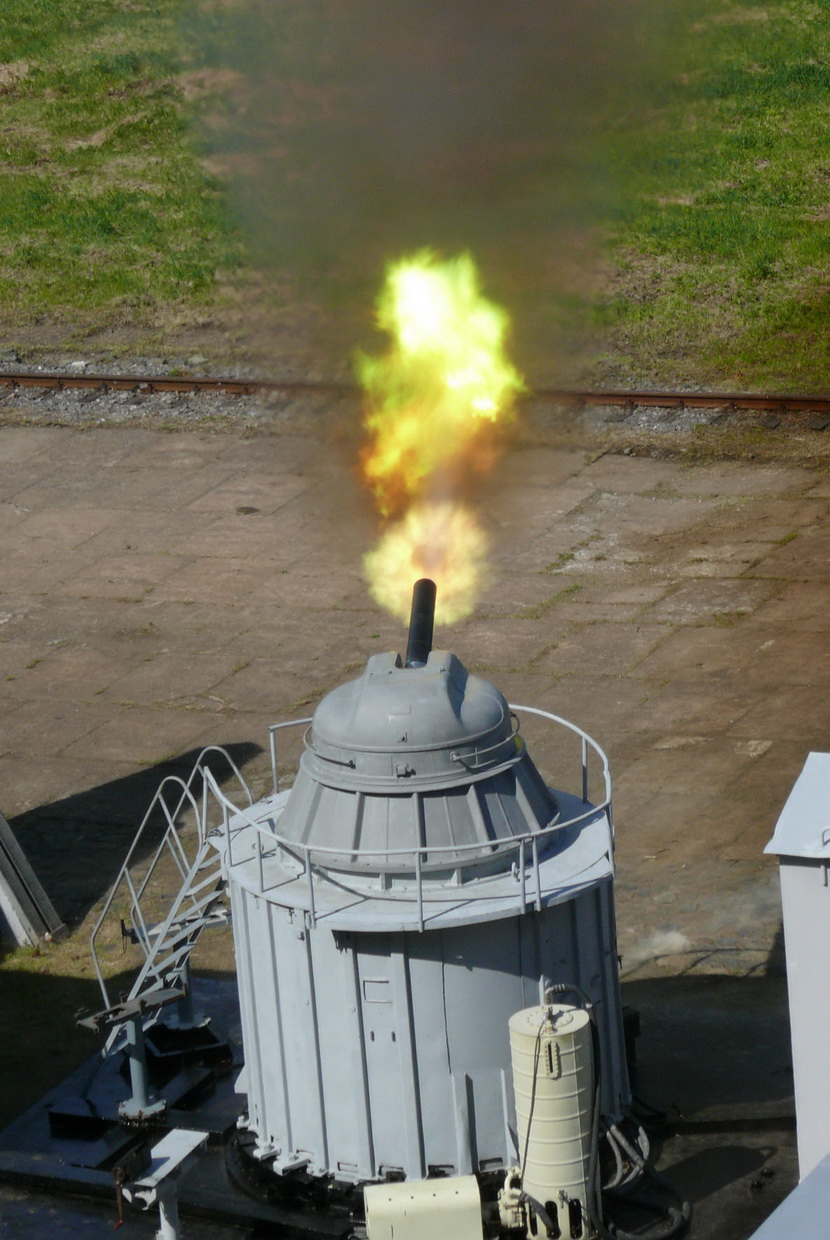 Tourelle AK630 faisant feu